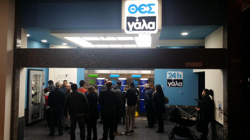 Kombination aus mehreren Milchautomaten für den Verkauf in Städten.